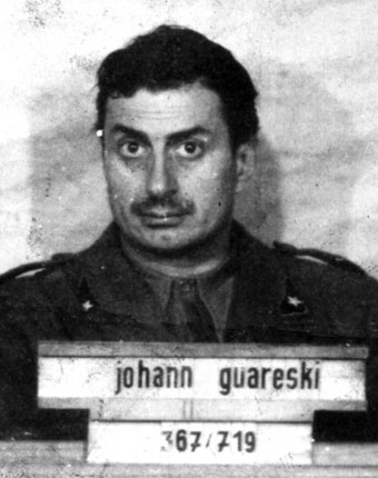 Giovannino Guareschi al tempo dei campi di concentramento.